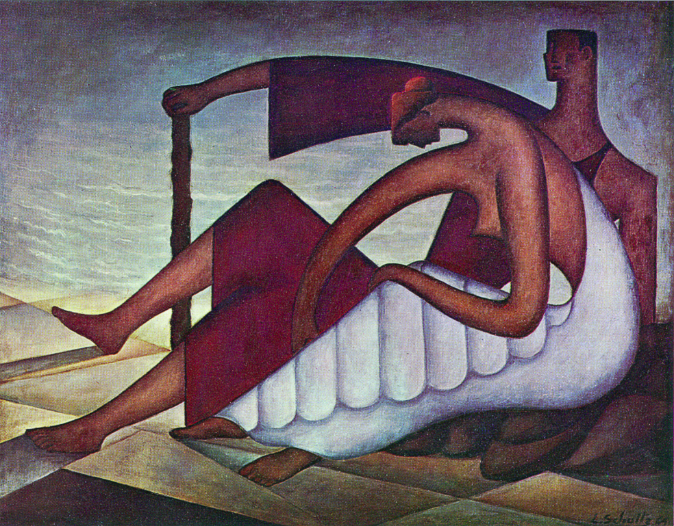 копия репродукции картины Льва Шульца "Пляж" 1964